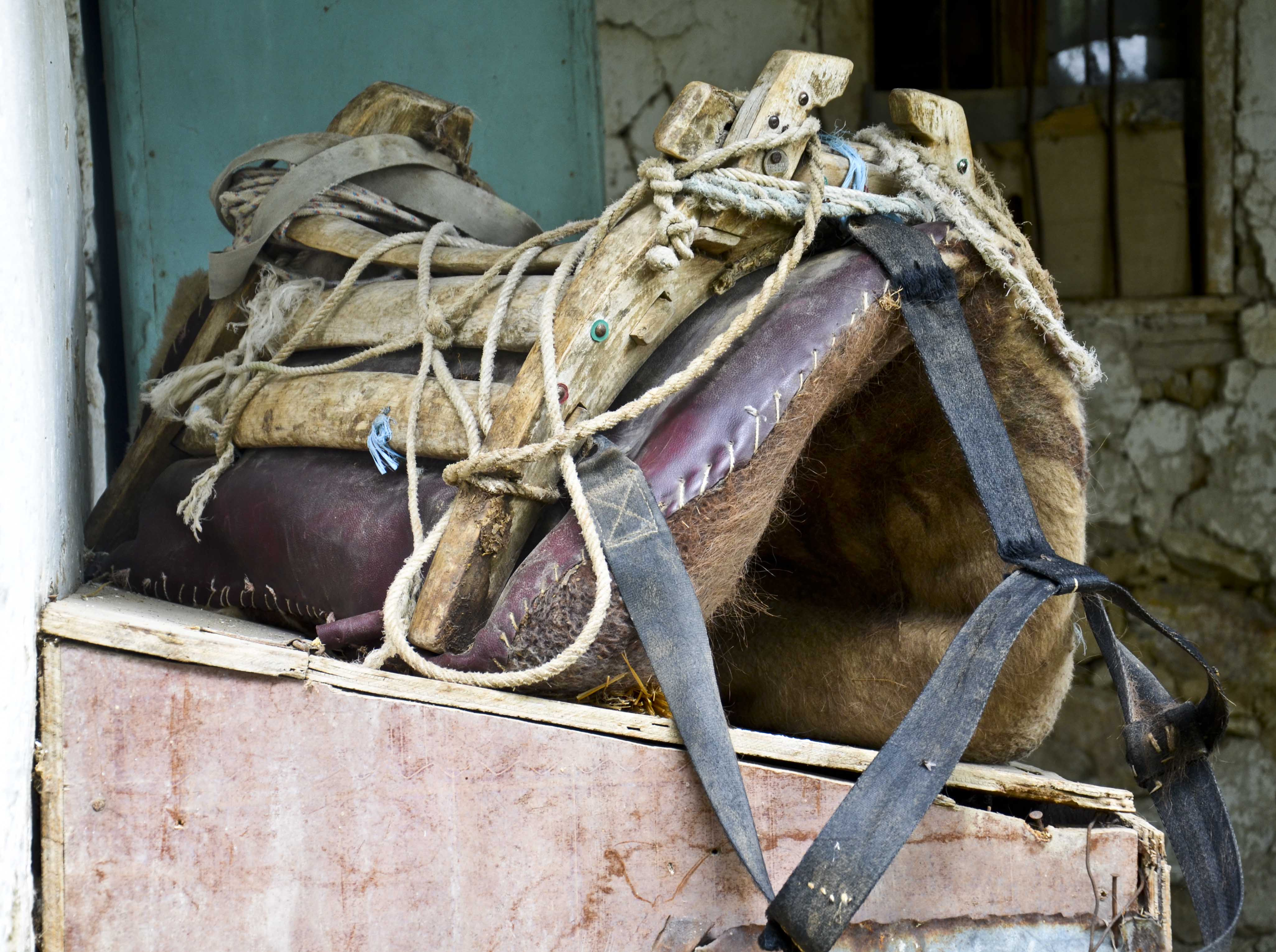 Самар од село Говрлево, скопско